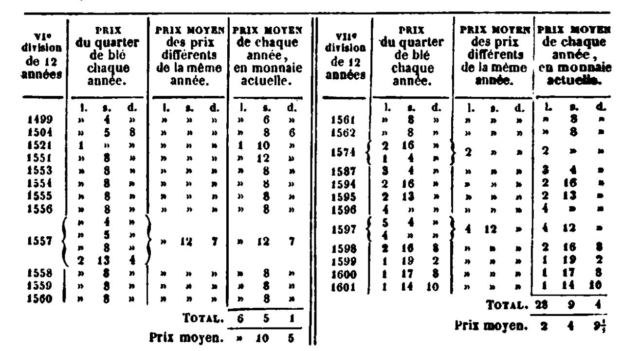 Recherches sur la nature et les causes de la richesse des nations. Tome 1